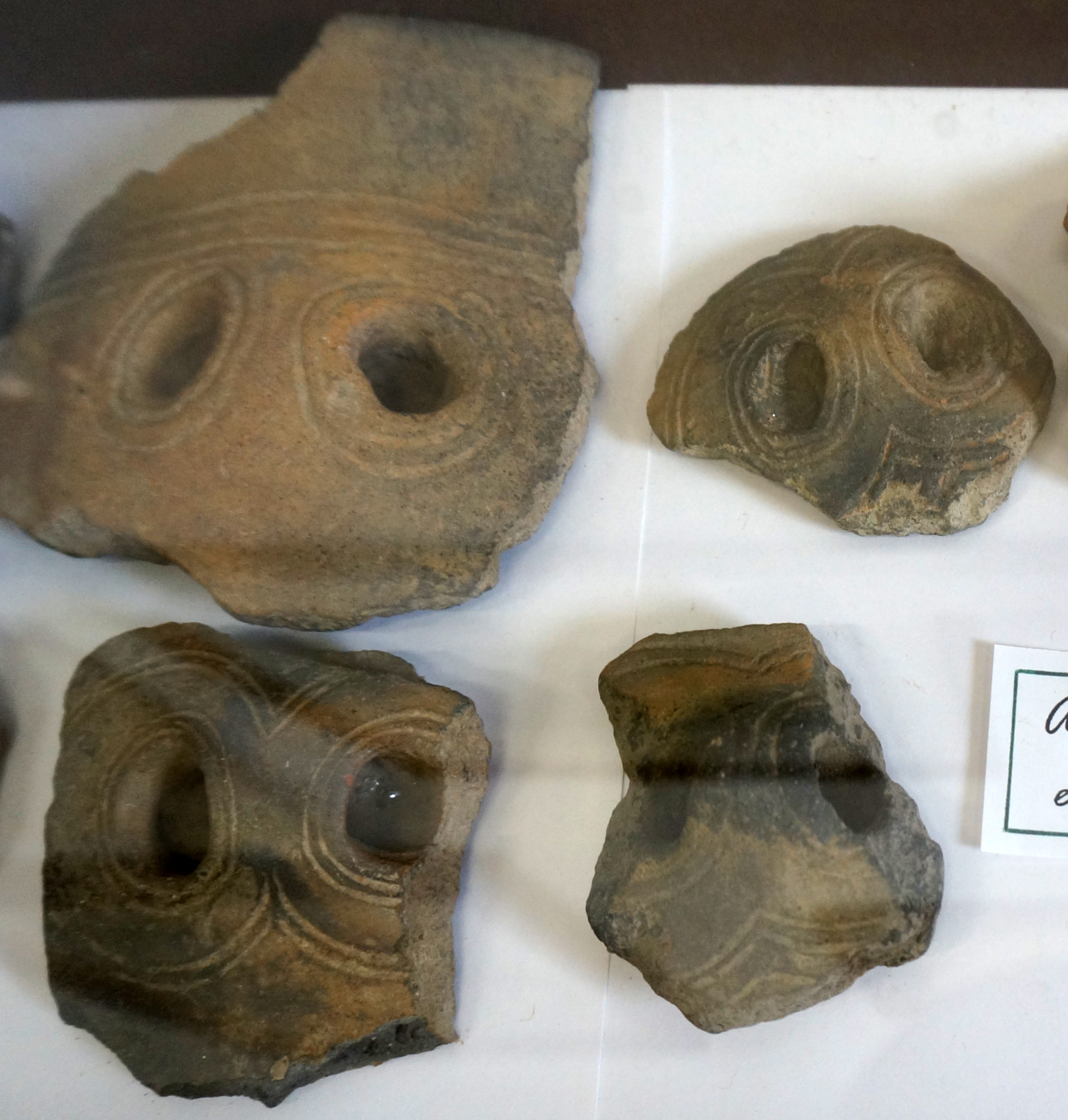 Présentés au Musée archéologique de Pons.